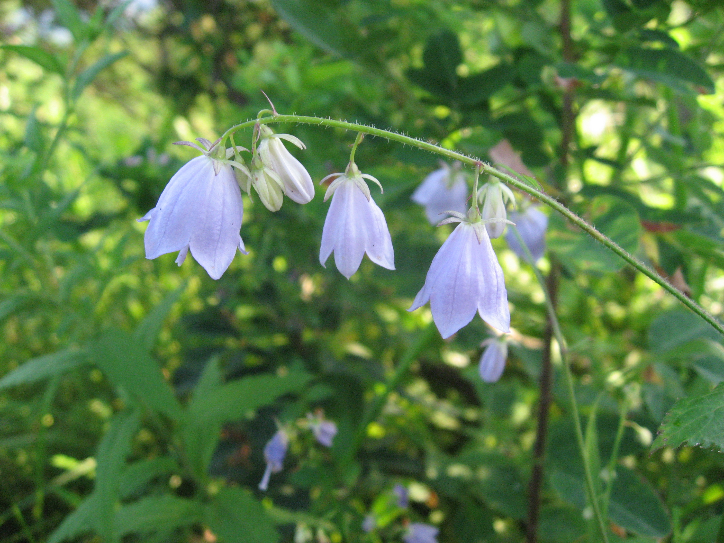 Adenophora_divaricata